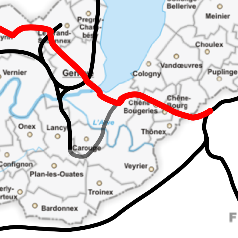 métro léger, variante au tracé du CEVA à Genève, Suisse